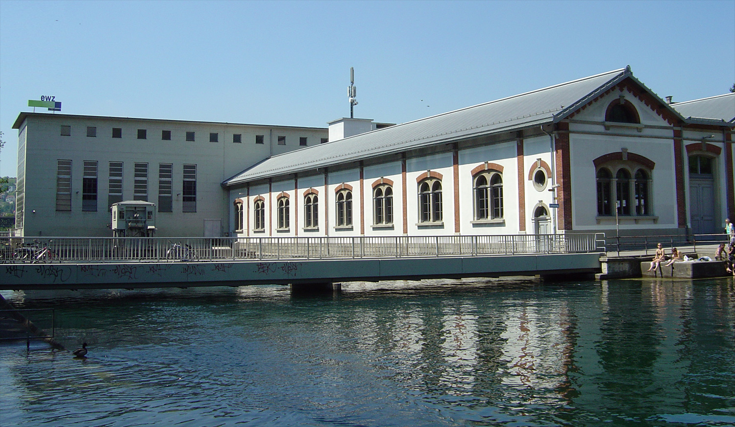 Das Flusskraftwerk Letten in Zürich